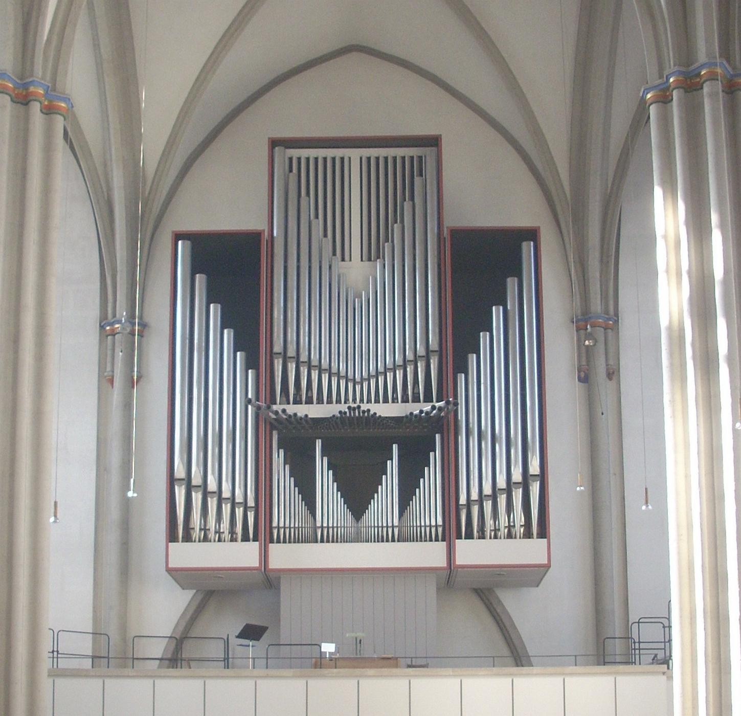 Braunschweig, St. Aegidien, Orgel